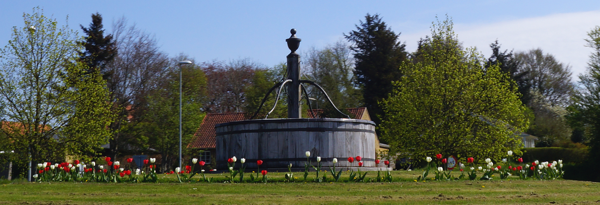 Brønd og blomster ved rundkørsel ved omfartsvej Christiansfeld.